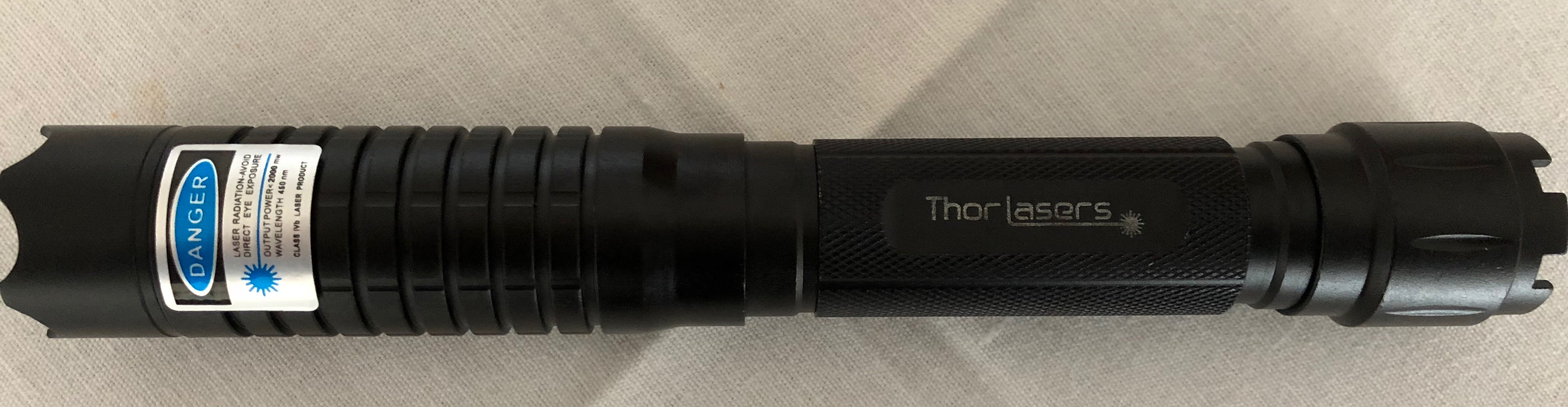 Blauer China Laserpointer mit einer Leistung von 1,6W